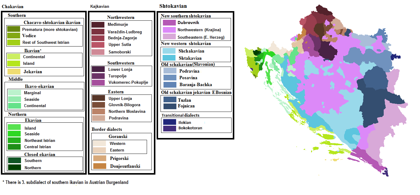 Dijalekti hrvatske kajkavice i čakavice, te poddijalekti hrvatske štokavice u RH i BiH